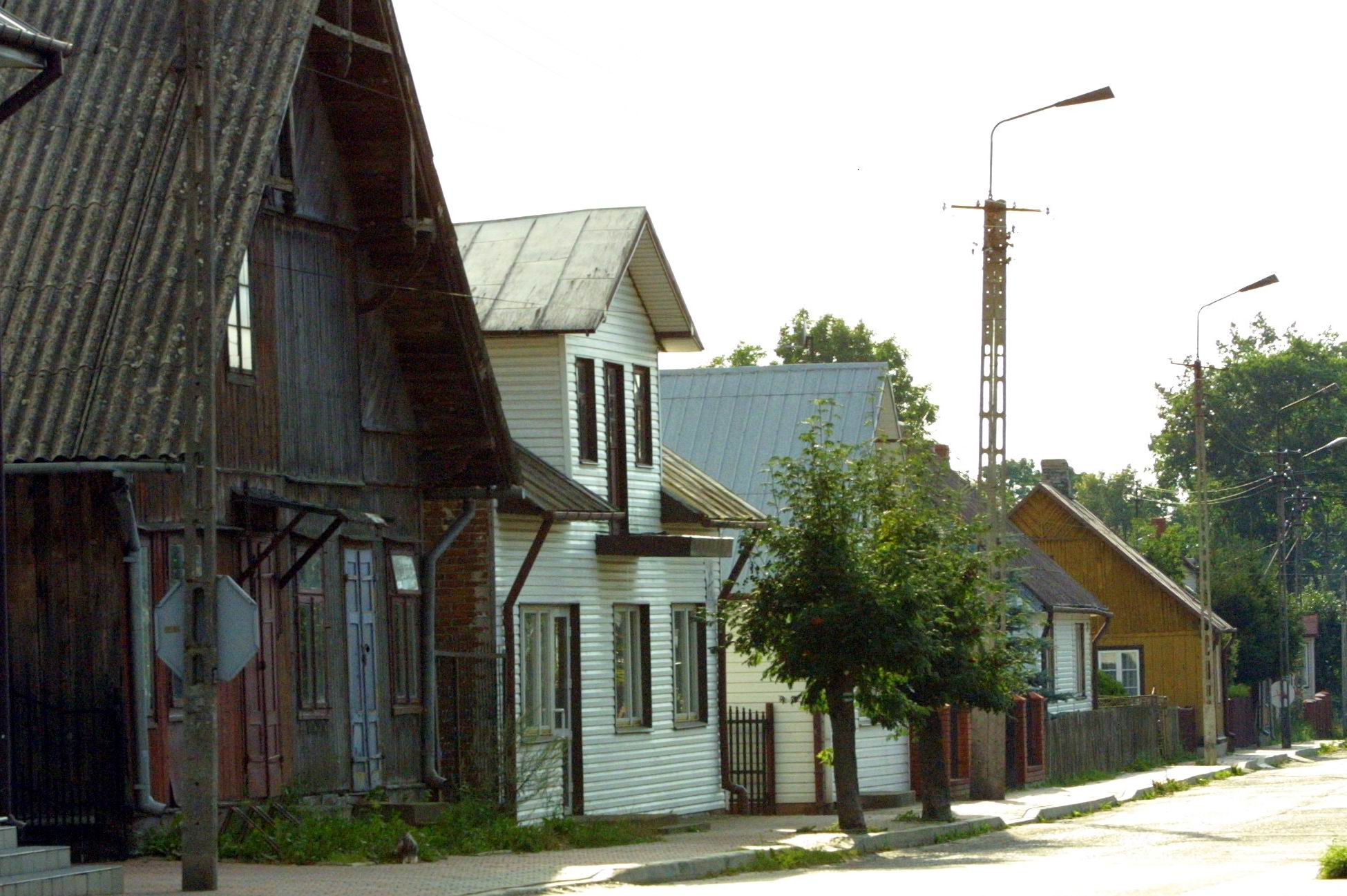 Nur. Małomiasteczkowa zabudowa północno-wschodniego Mazowsza.